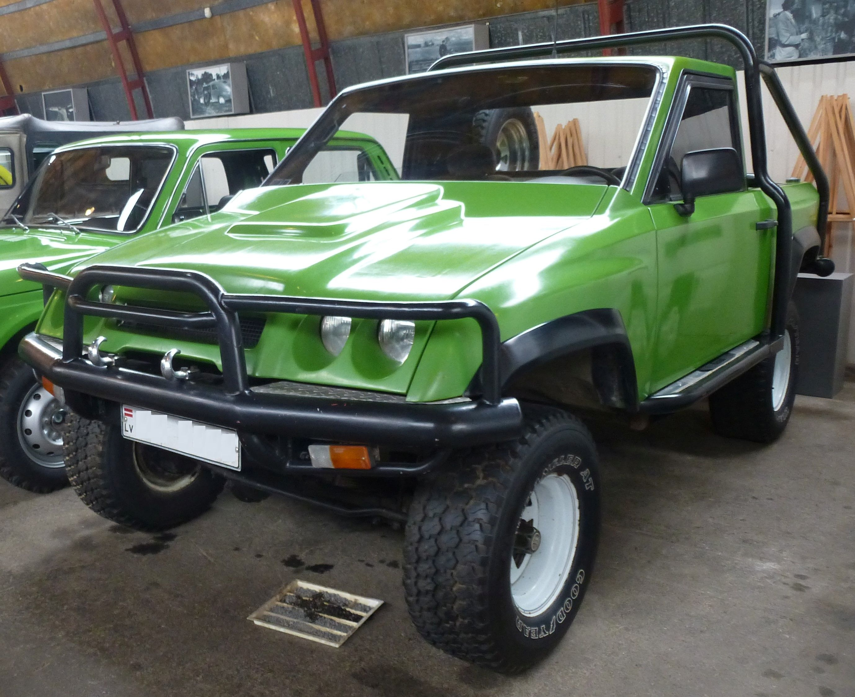 Baltijas Dzips 1995